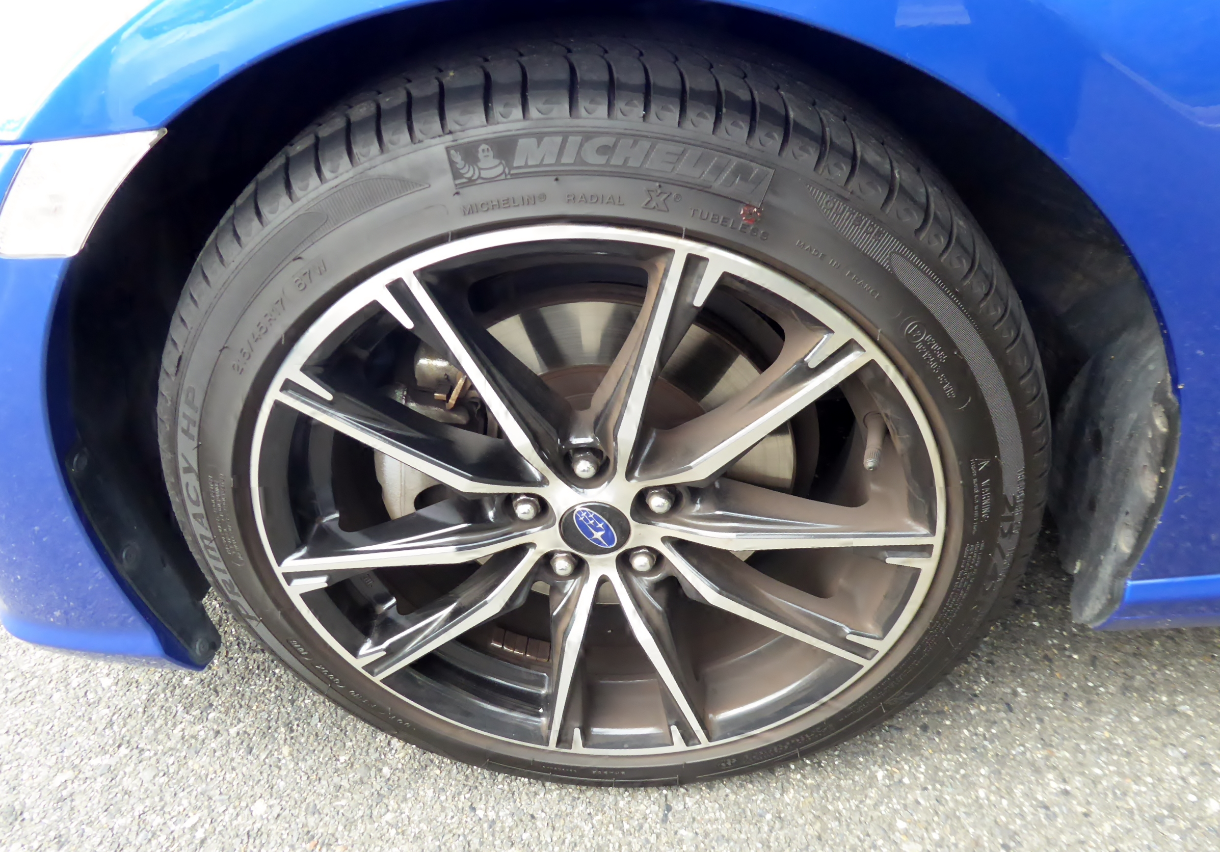 オプションパーツ装着のDBA-ZC6型スバル・BRZ Sのホイールを撮影。